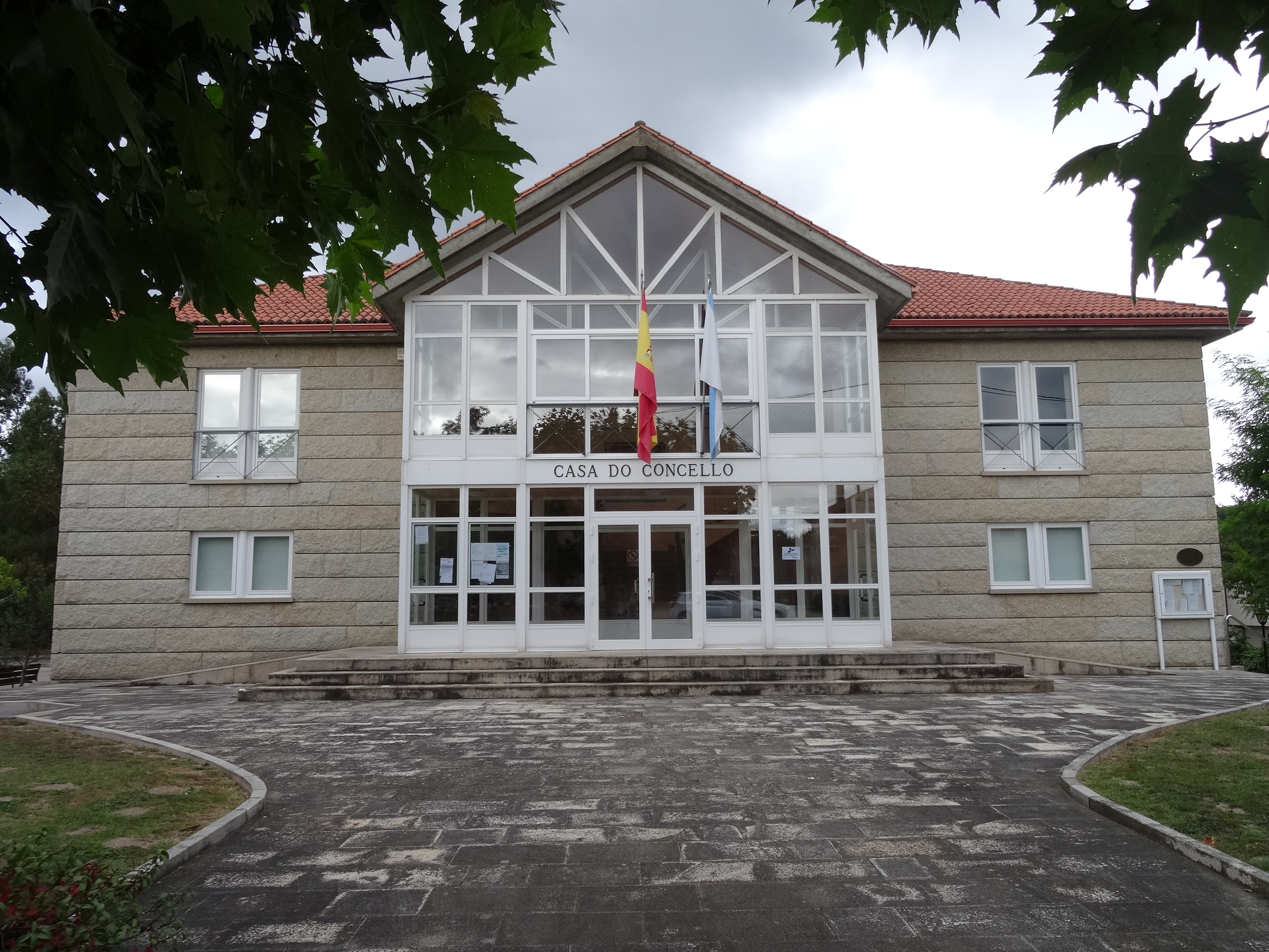 Casa concello Paderne de Allariz, Ourense